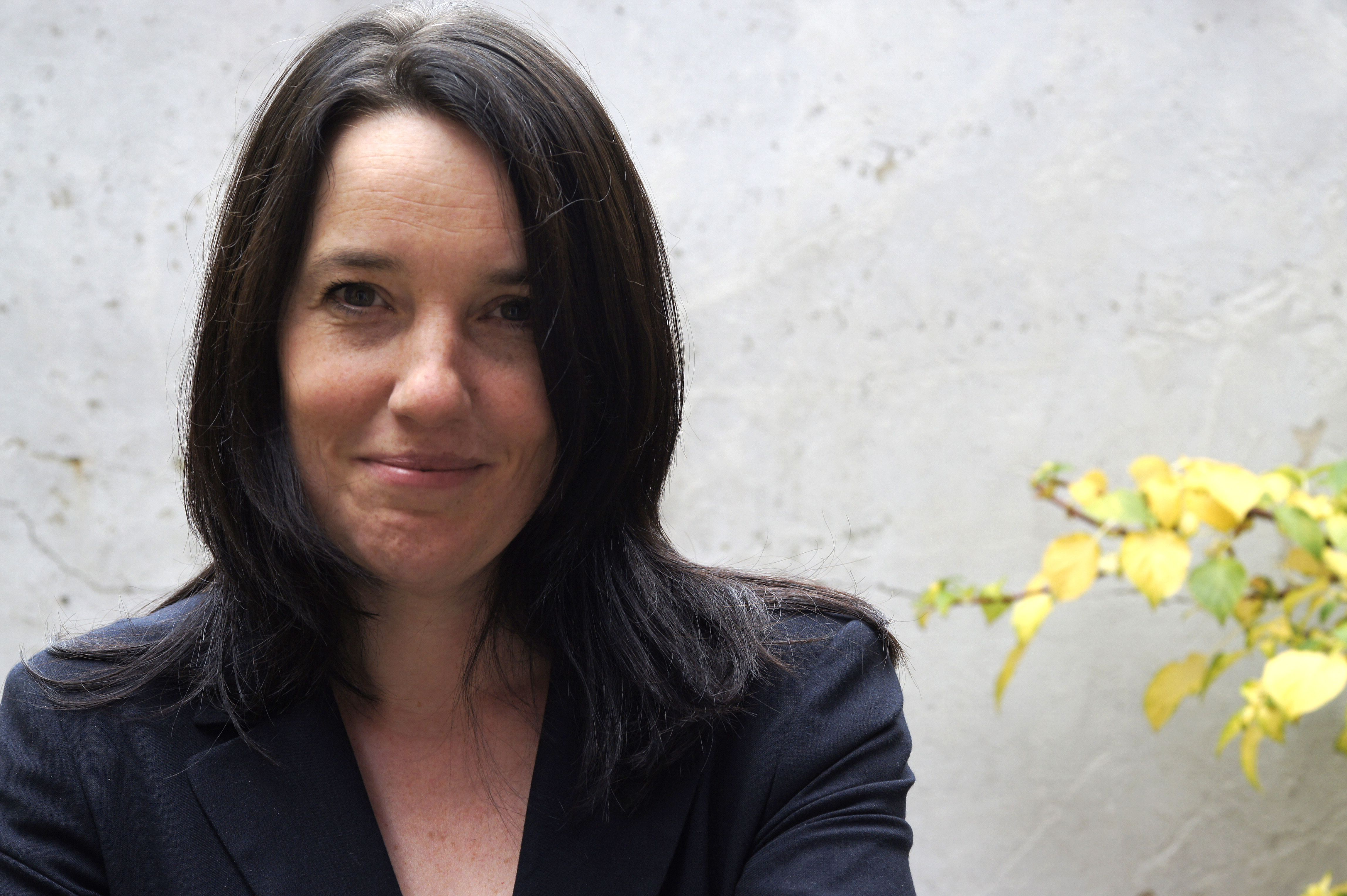 Julia Wallner, Direktorin Georg Kolbe Museum